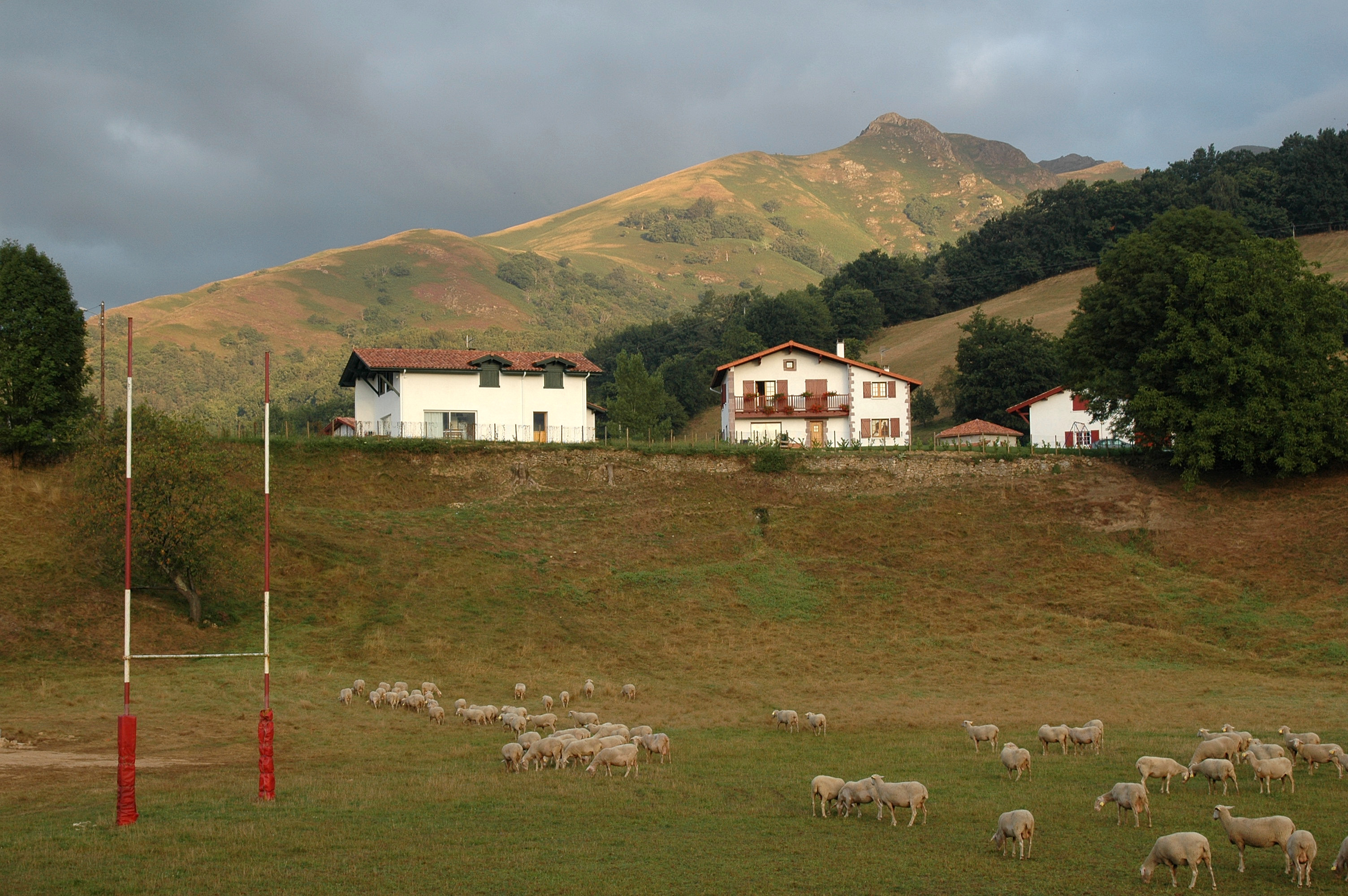 Saint-Étienne-de-Baïgorry, le terrain de rugby envahi par les moutons. Photo prise le 11/08/06 par Harrieta171